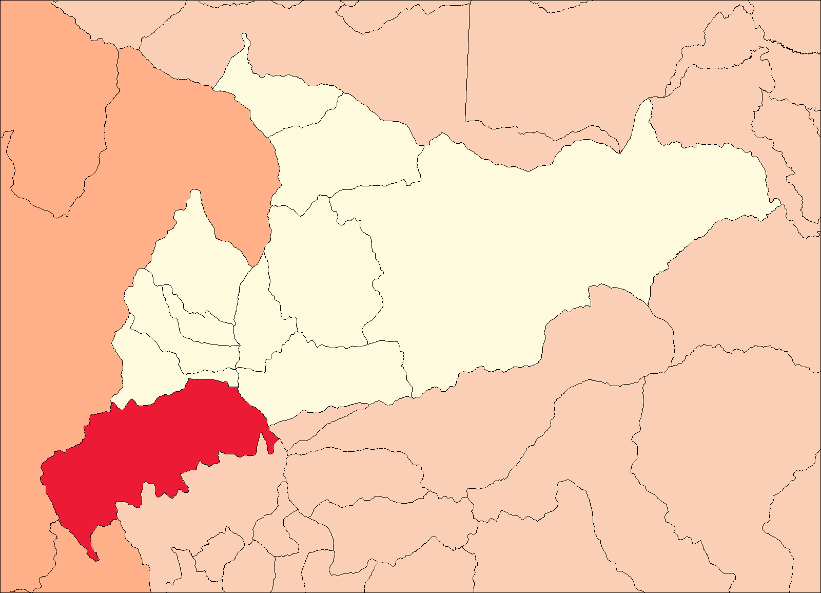 Área del Distrito de Llata.